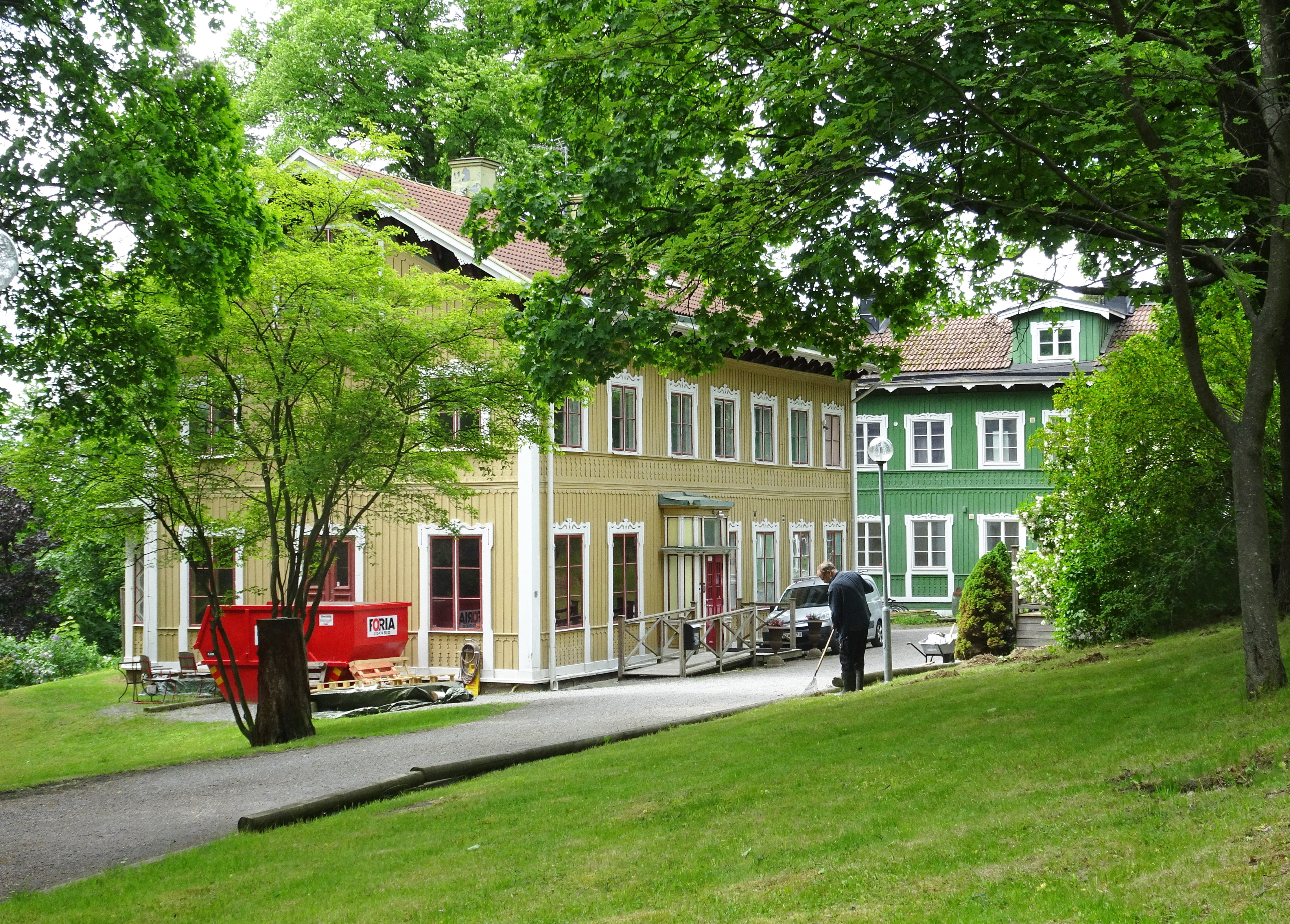 Väntorp, Ulriksdal, bakom den flygeln